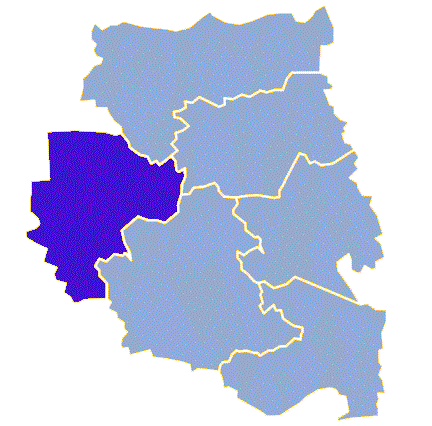 Powiat międzyrzecki, gmina Bledzew